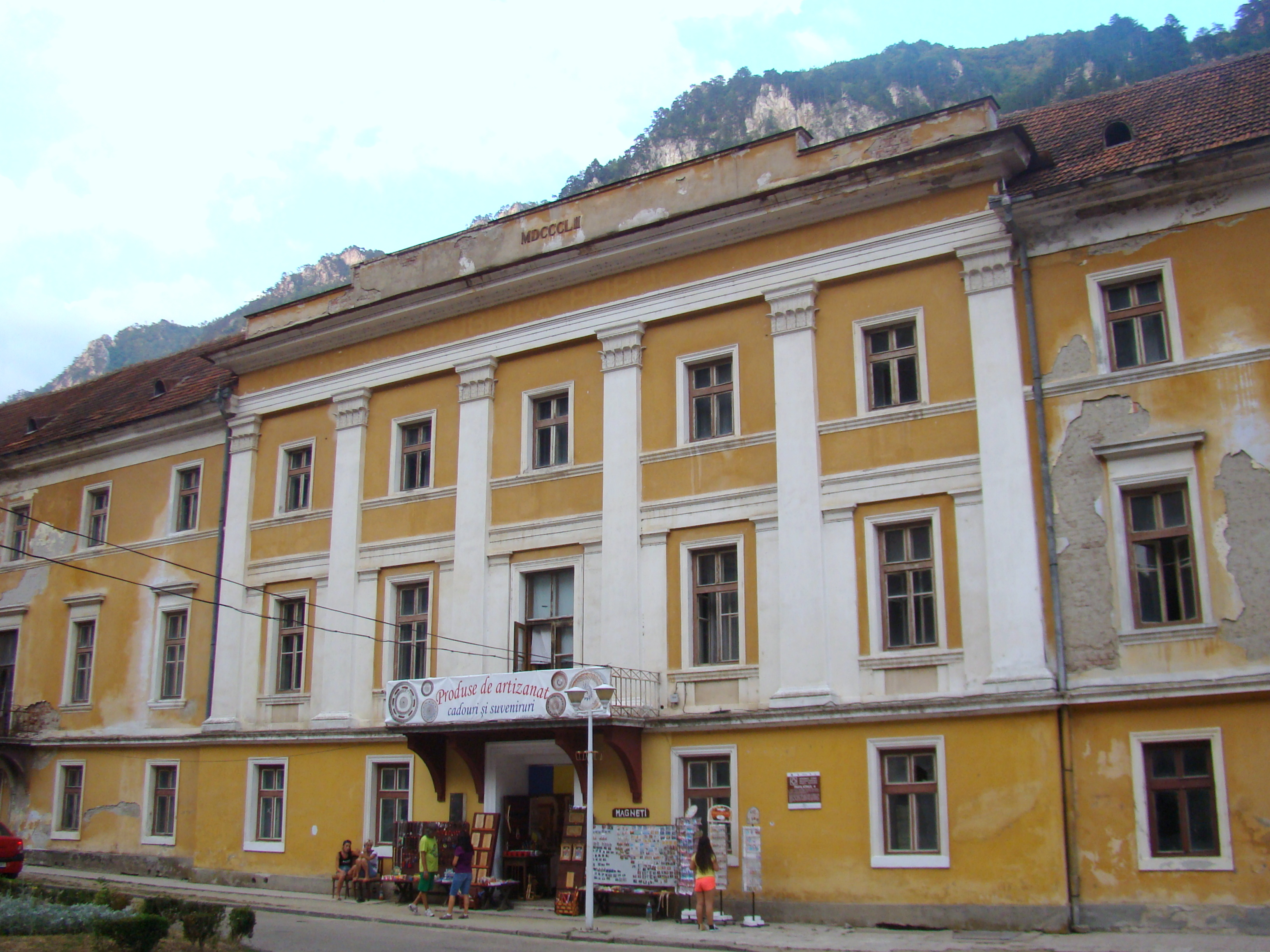 Fostul „Sanatoriul ofițeresc”, fost Hotel "Severin" 02